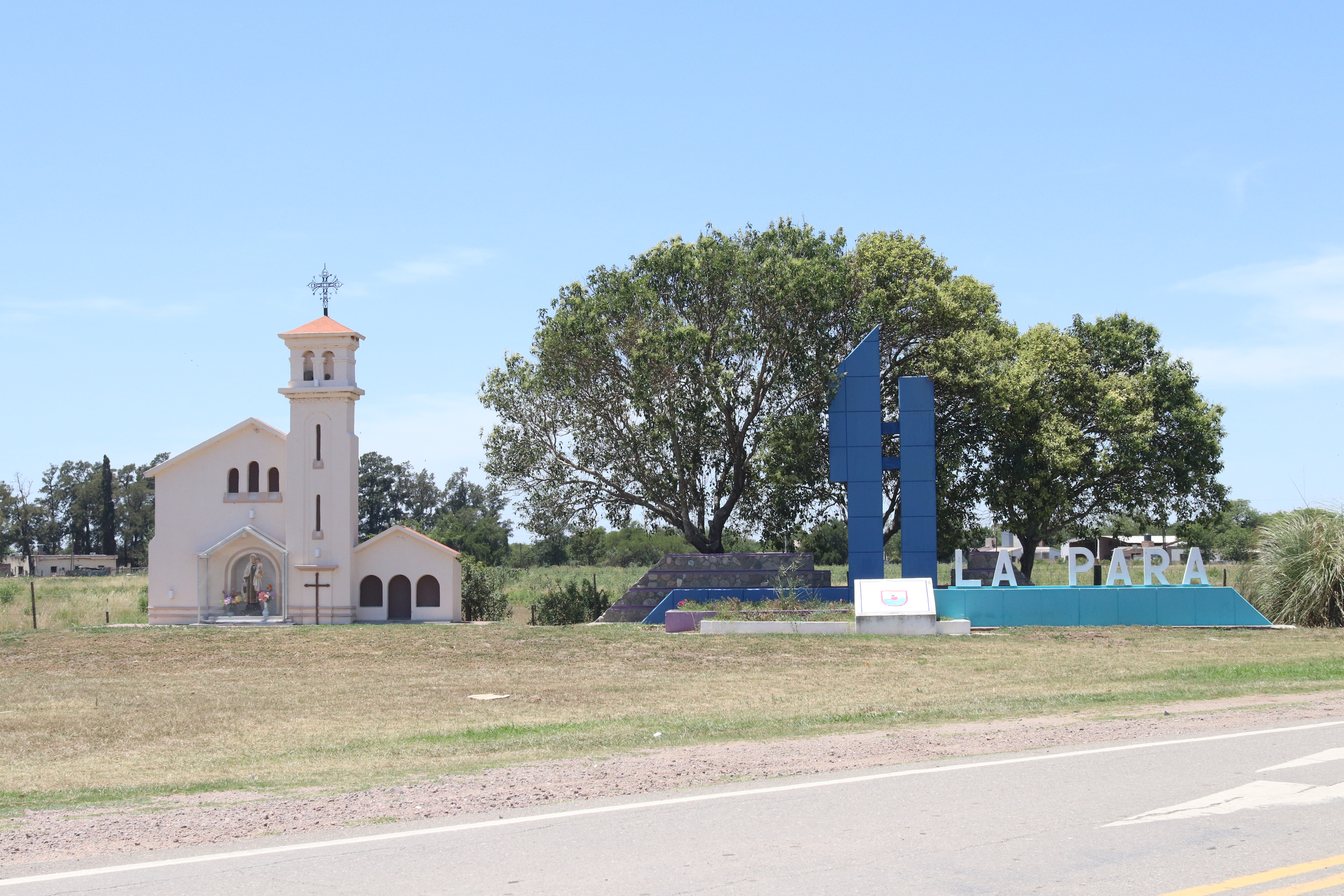 La Para